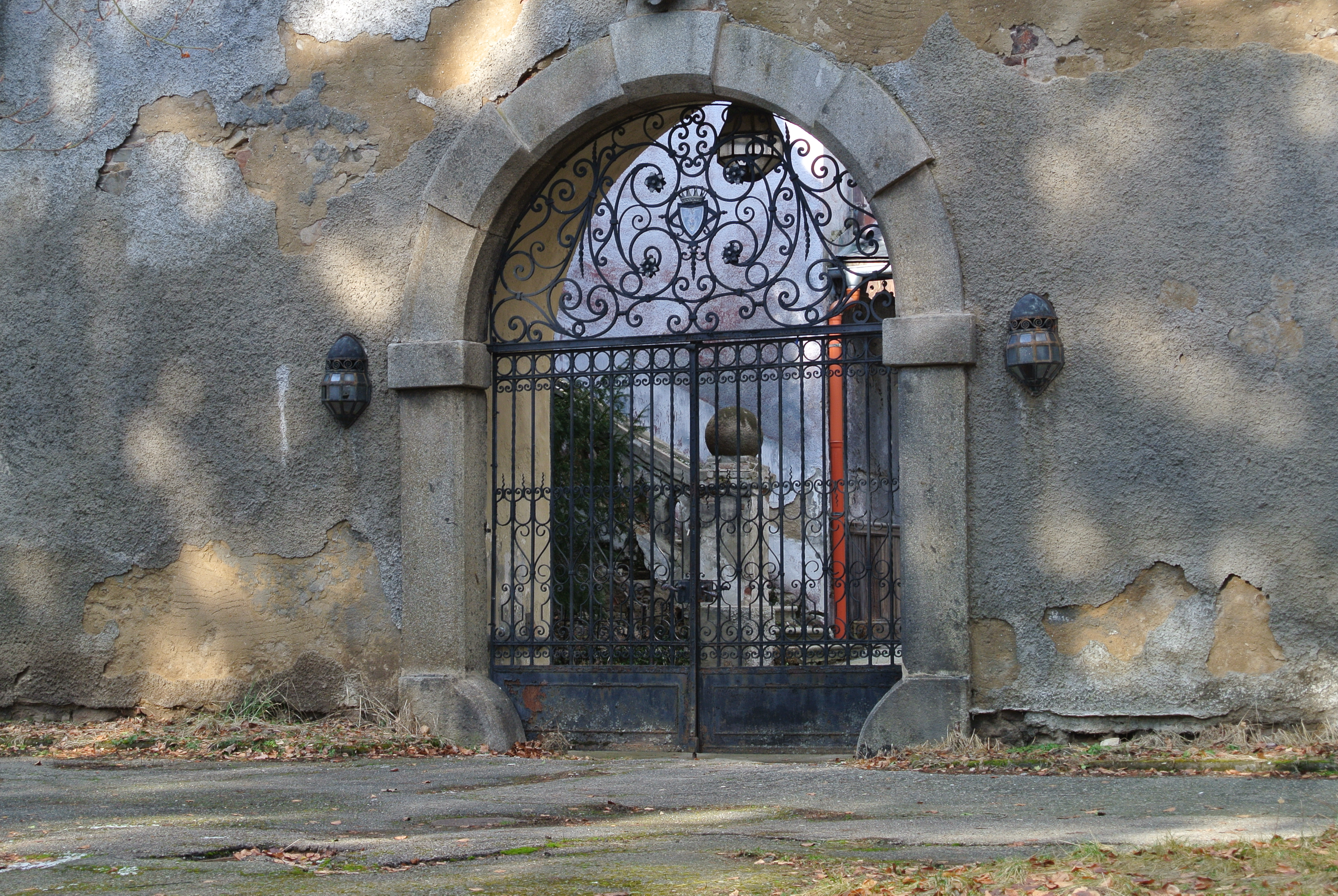 Zámek Líšno, Líšno 32